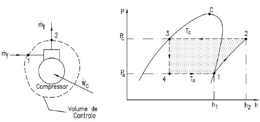 compressor